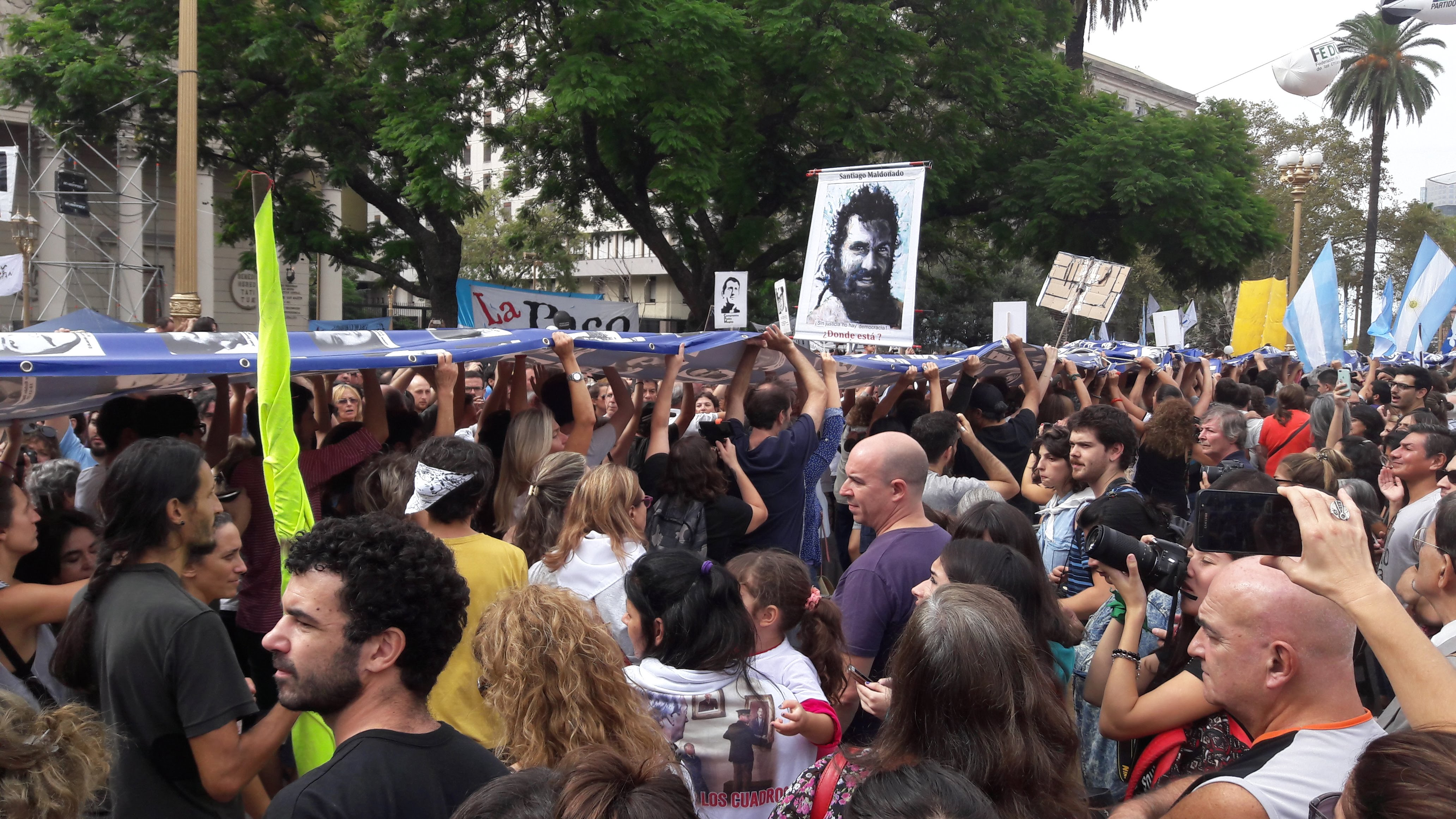 24M Marcha de la Memoria por la Verdad y Justicia en Buenos Aires, Argentina.